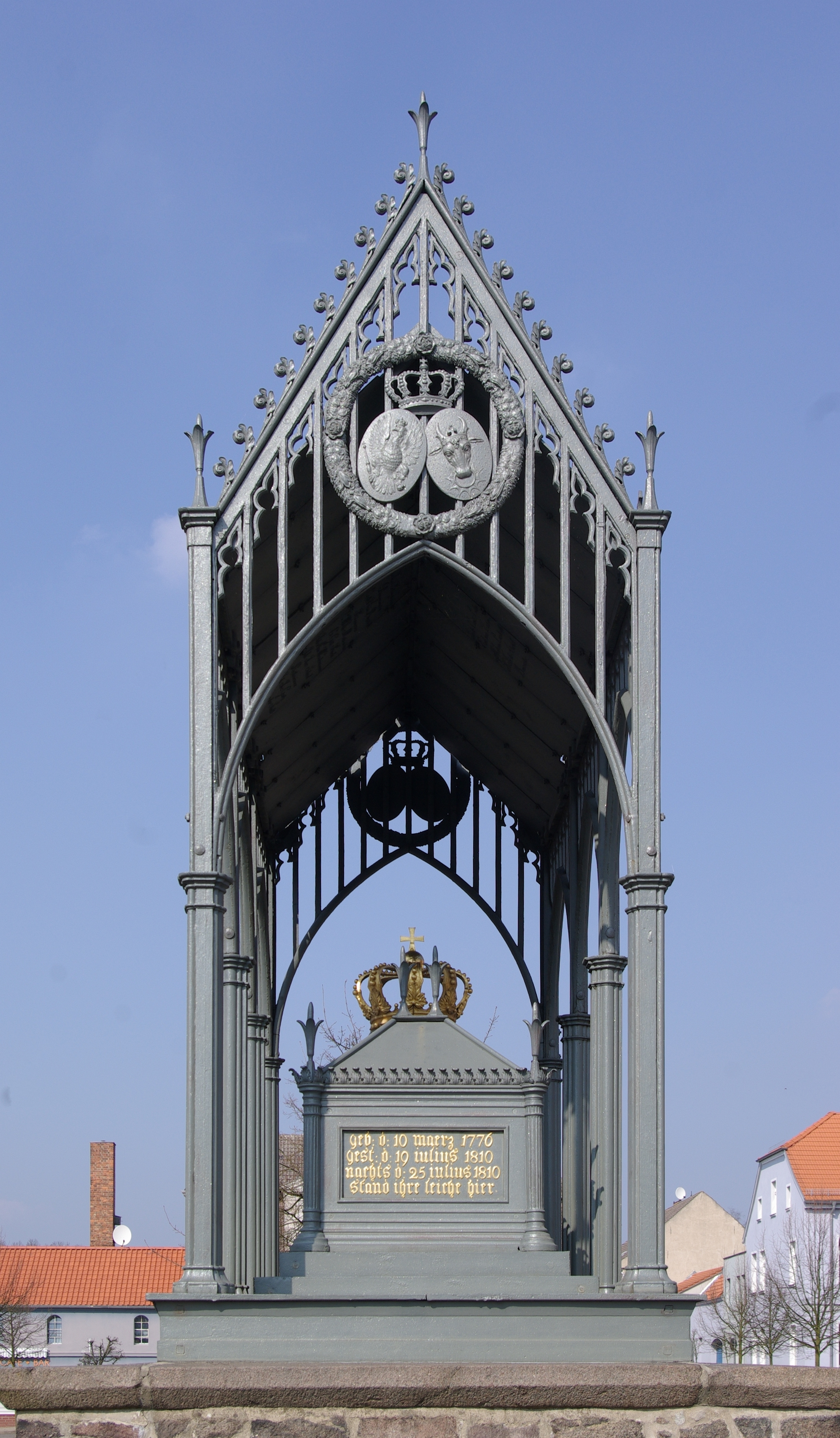 Granssee in Brandenburg. Das Denkmal für Königin Louise steht auf dem Schinkelplatz und steht unter Denkmalschutz. Ersteller War Friedrich Schinkel.